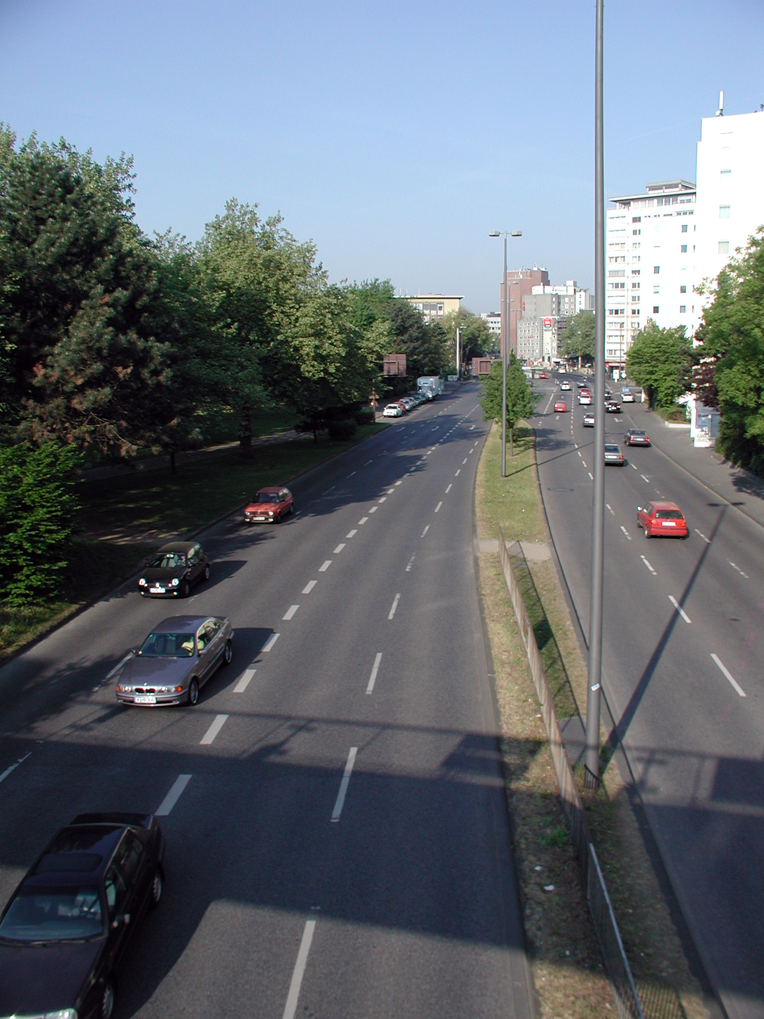 Kölner Bäche (historische Kölner Bachstraßen)